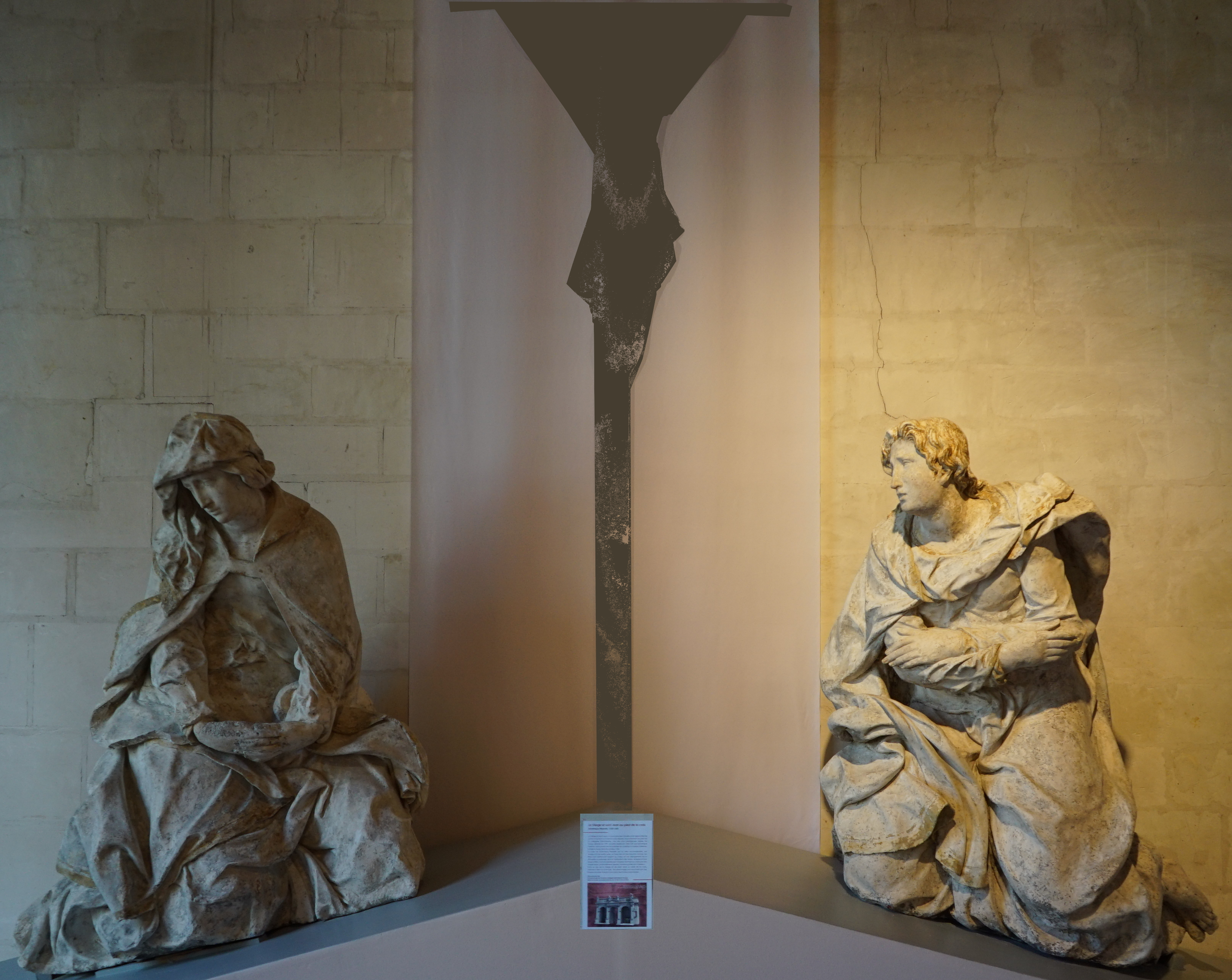 partie du jubé de la Collégiale Saint-Étienne.